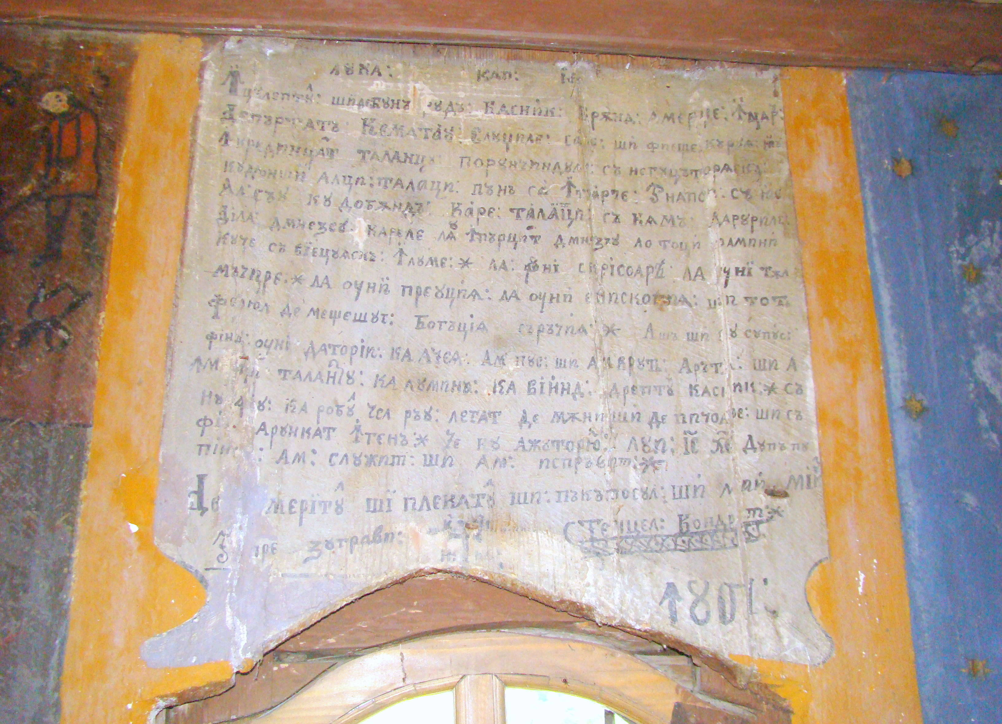 Biserica de lemn „Sfinții Arhangheli” din Năsal